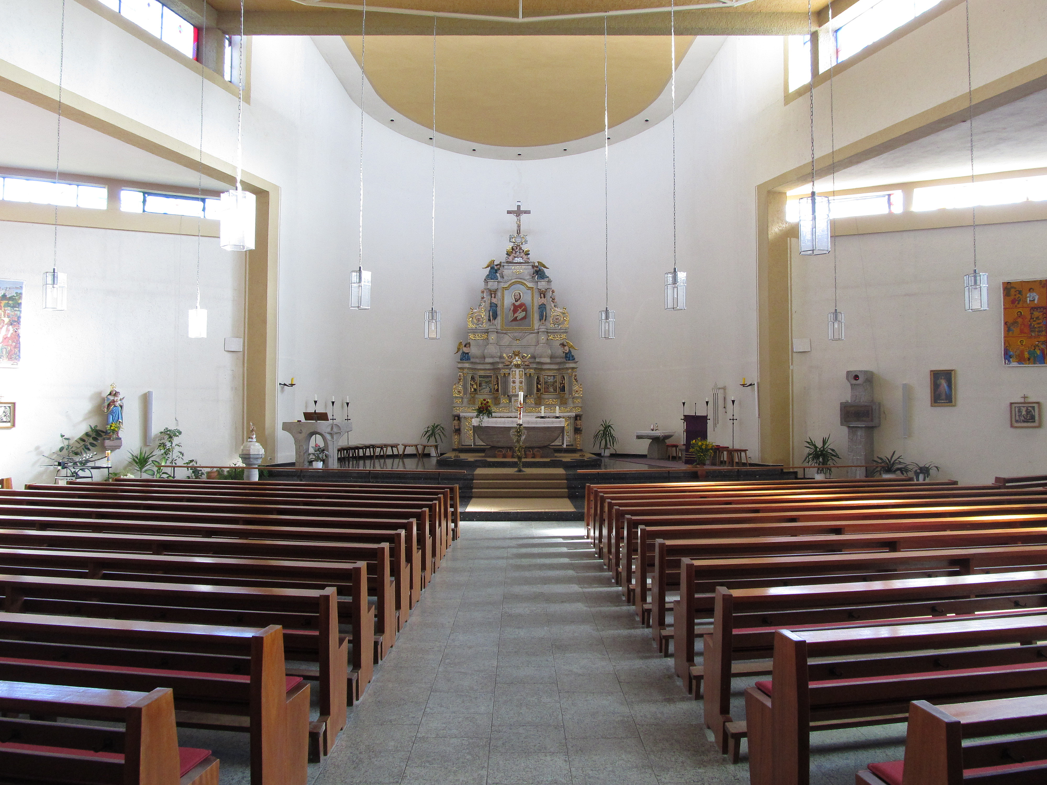 Blick ins Innere der katholischen Pfarrkirche St. Paulus in Bliesmengen-Bolchen, Gemeinde Mandelbachtal, Saarland